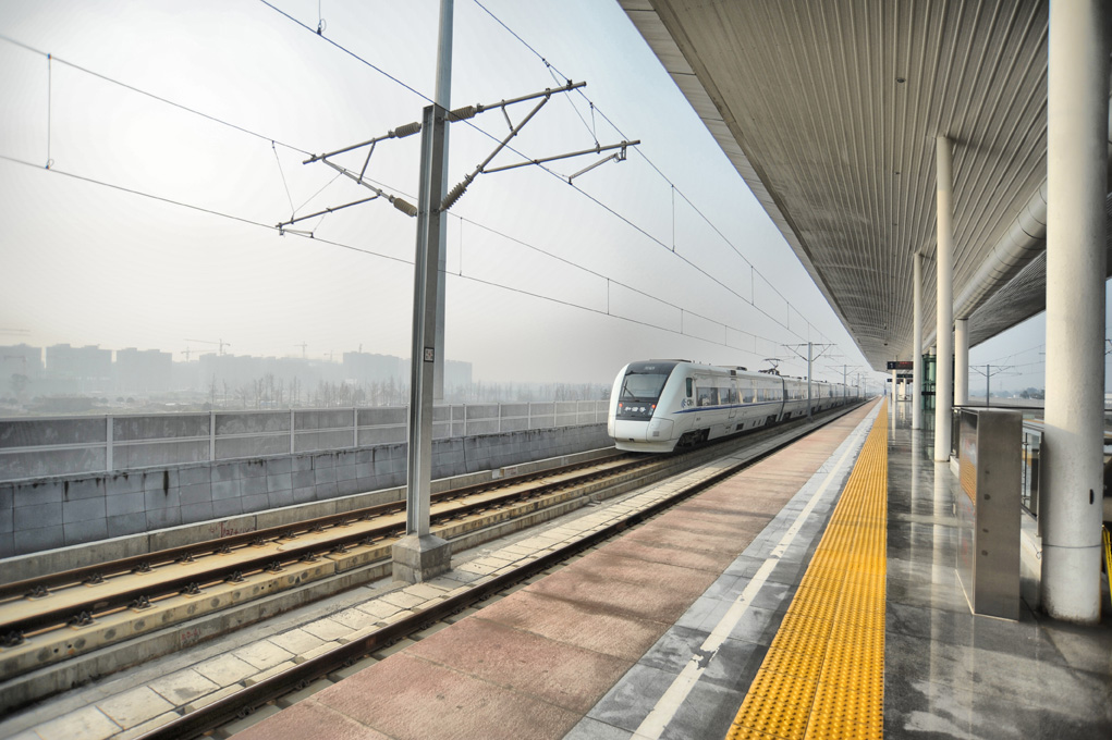 郫县西站站台